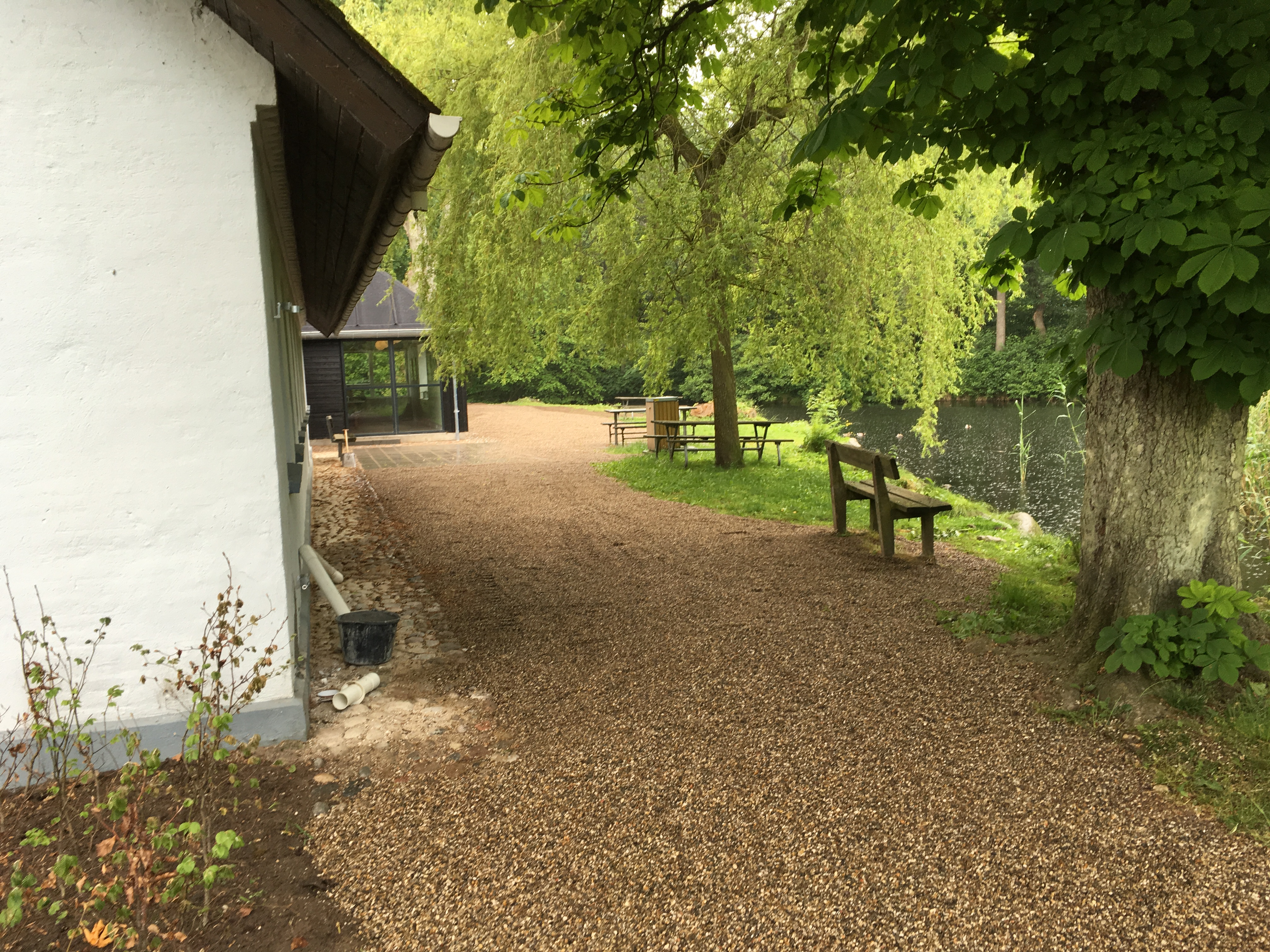 Stien ved Rosendalssøen, ved Hadsund Egnssamling.